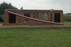 Pomnik upamiętniający społeczność żydowską w Kurowie (woj. lubelskie) oraz mieszkańców tego miasta, którzy ratowali Żydów w czasie wojny odsłonięty we wrześniu 2017 na miejscowym kirkucie